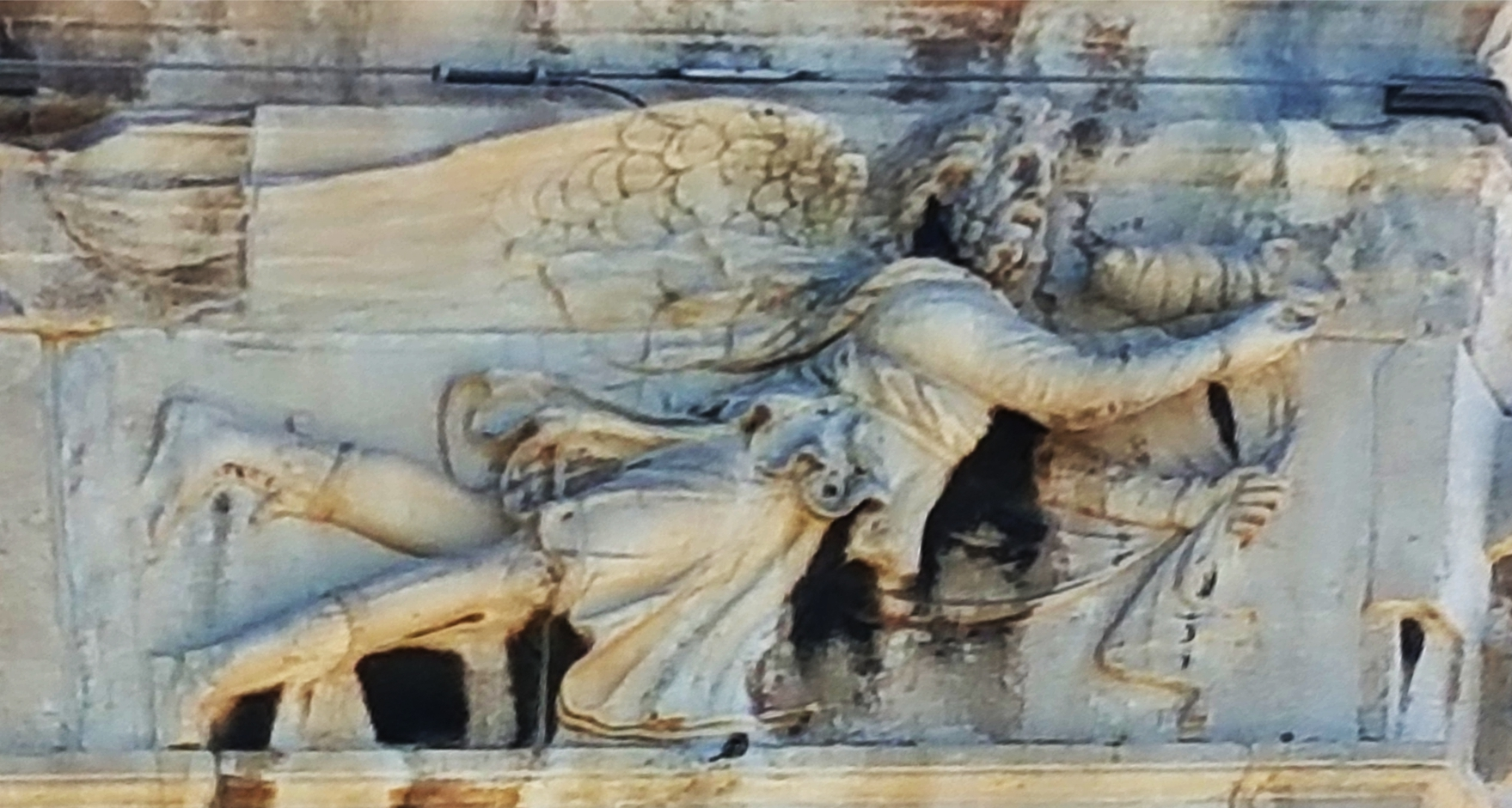 La Tour des Vents à Athènes : Nord - Borée